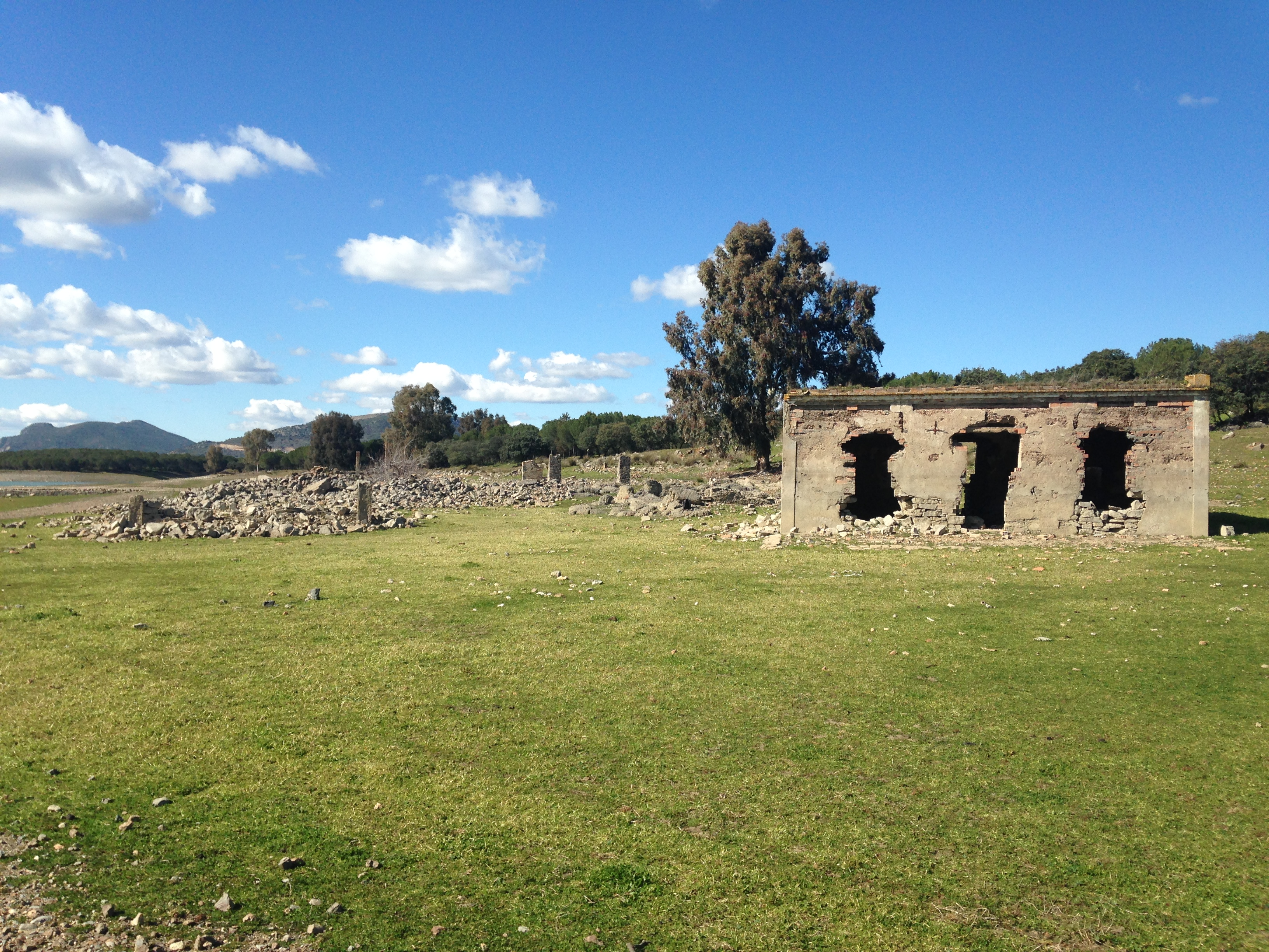 Antigua estación de la Alhondiguilla (Córdoba)